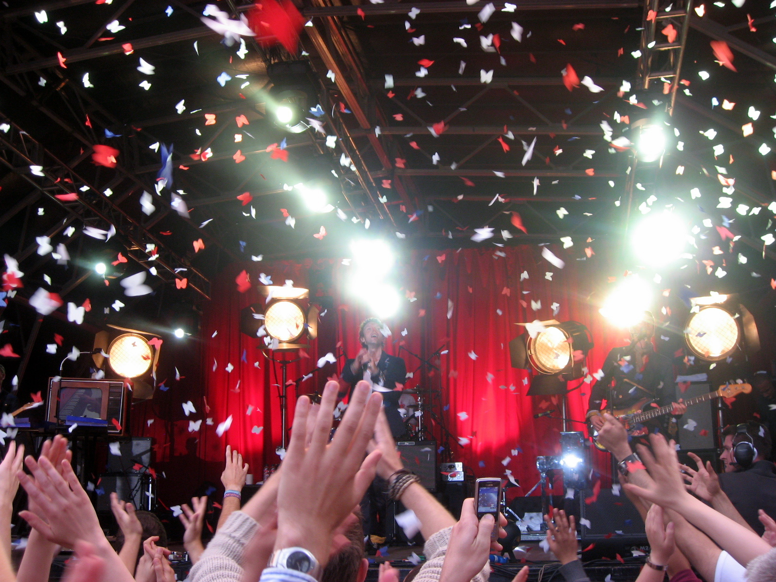 Butterfly confetti, classssy